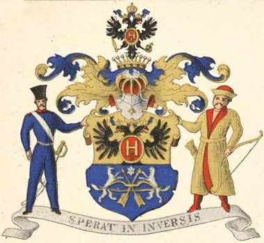 Speranski suguvõsa krahvivapp